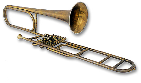 Ventilbassposaune (Quartbassposaune) von Ernst Ferdinand Geipel, Markneukirchen